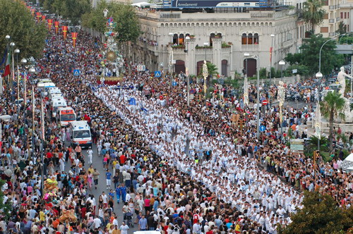 La vara, coi tiratori e gli astanti, nei pressi della fontana del Nettuno